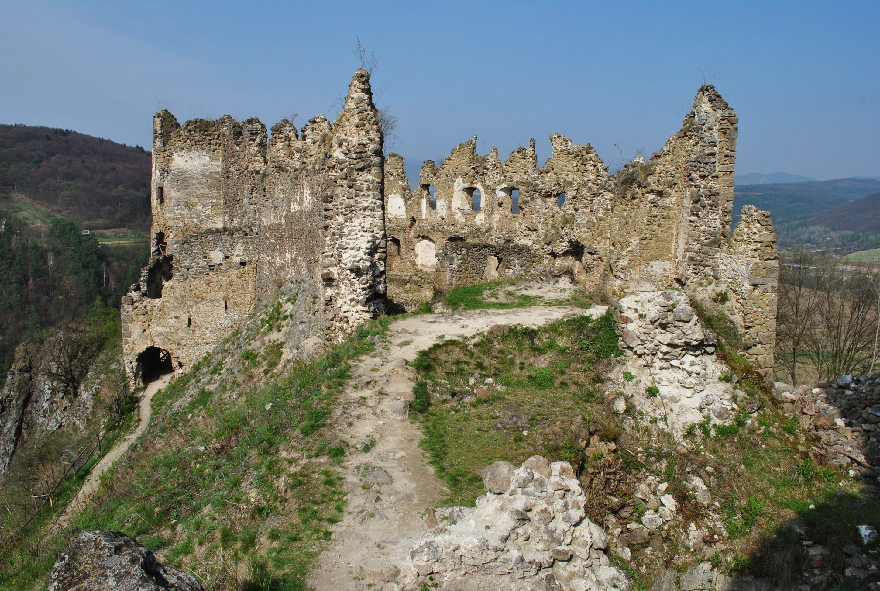 Šášovský hrad